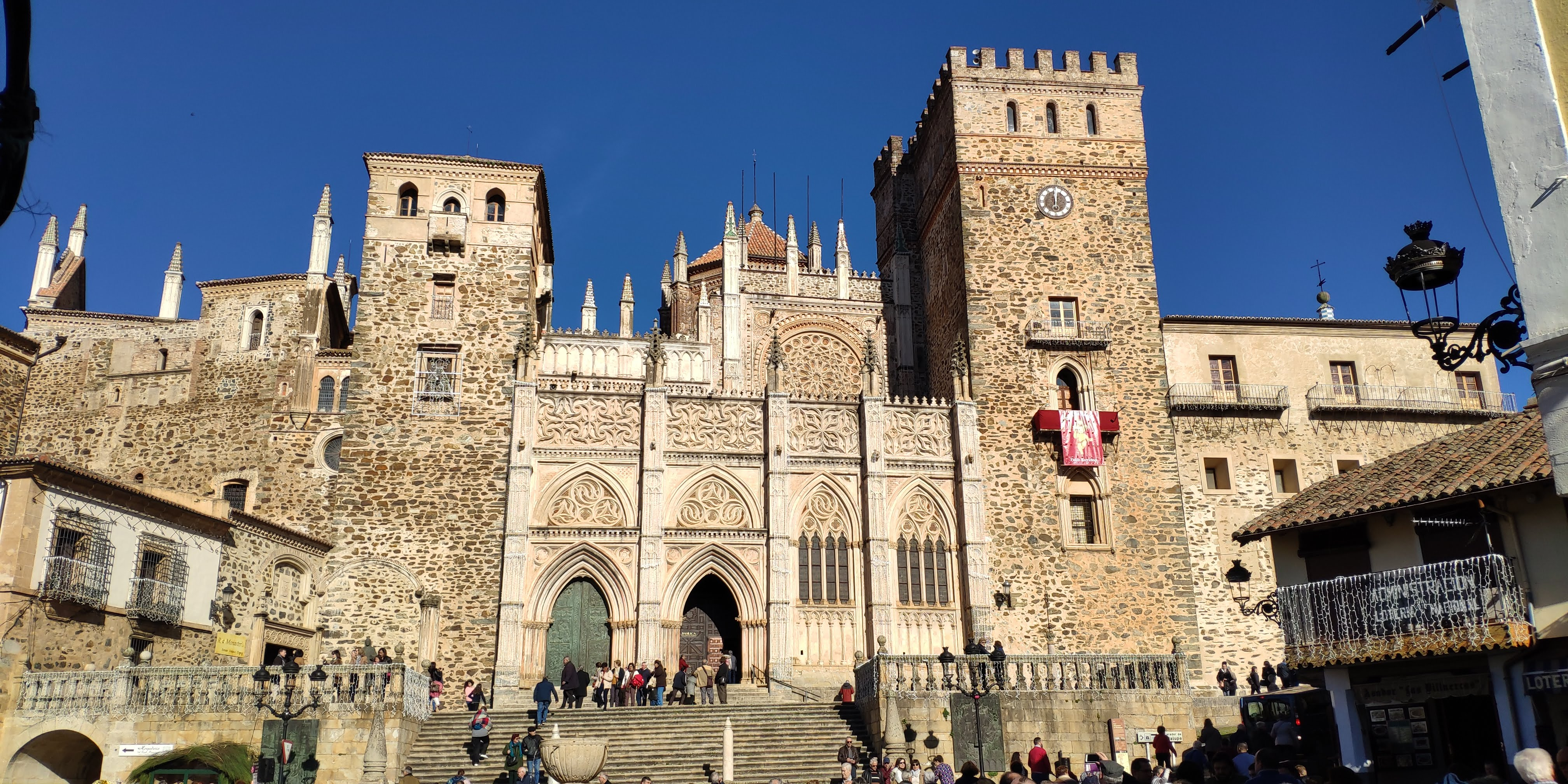 Fachada del Real Monasterio de Ntra. Sra. de Guadalupe, Cáceres